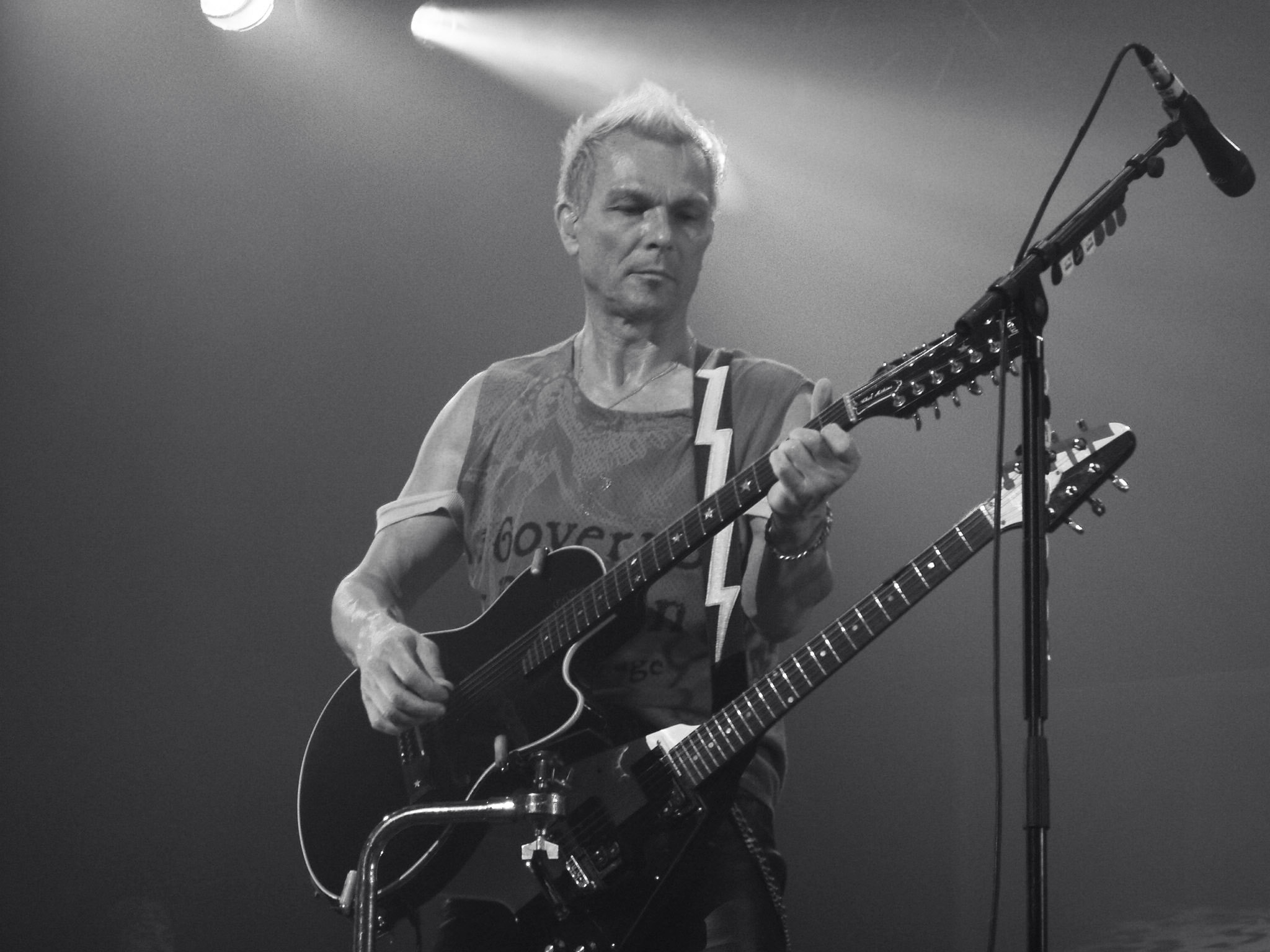 Rudolf Schenker au Zénith de Nantes en 2007